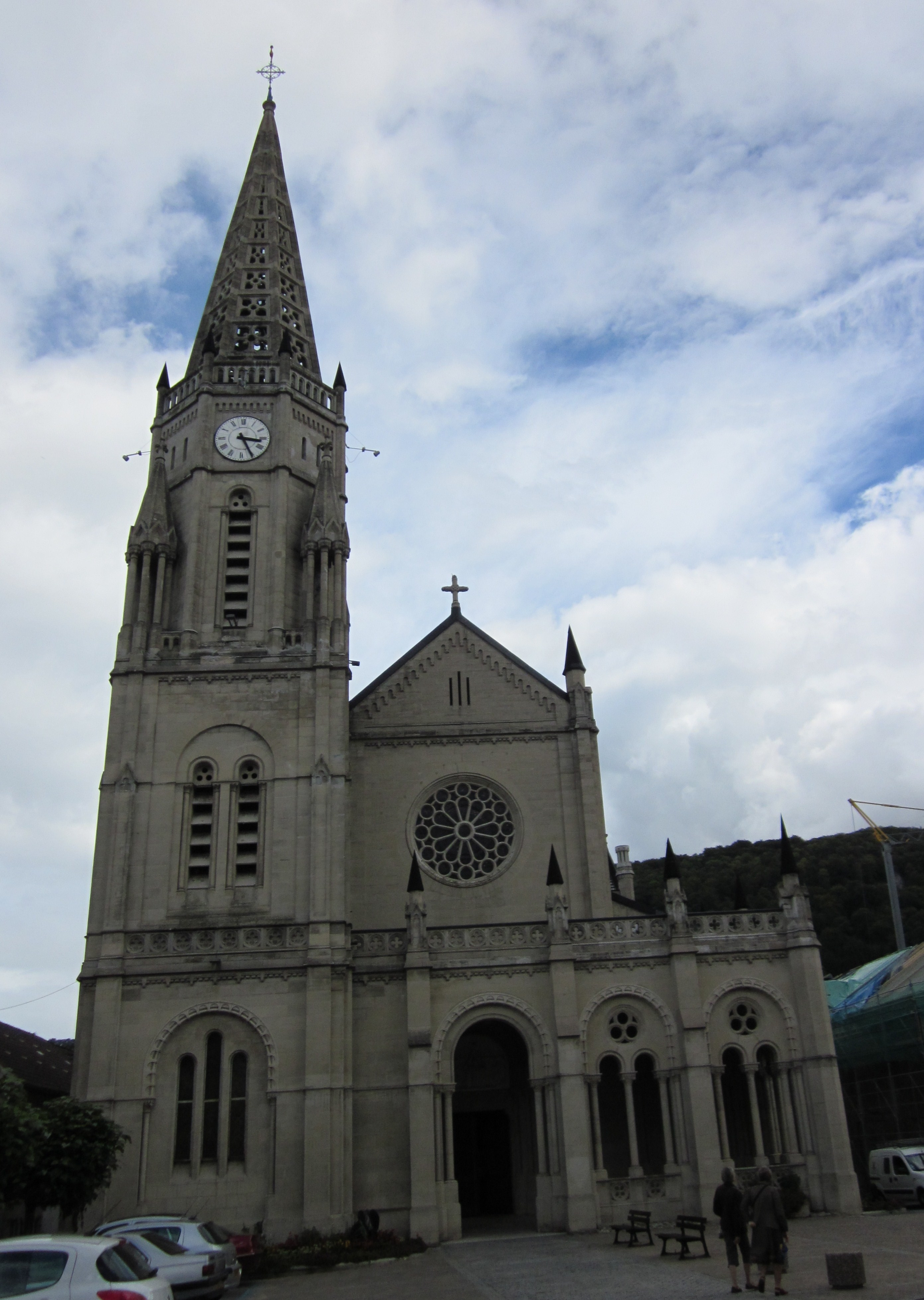 Eglise de la Nativité-de-Notre-Dame à Pont-de-Roide - L’église a été construite de 1927 à 1931 par l’architecte Lucien Reboux. Elle remplaçait l’ancienne église de 1753.